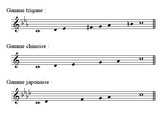 Description : Gamme tzigane, chinoise, japonaise Source : Personnelle Licence : GFDL